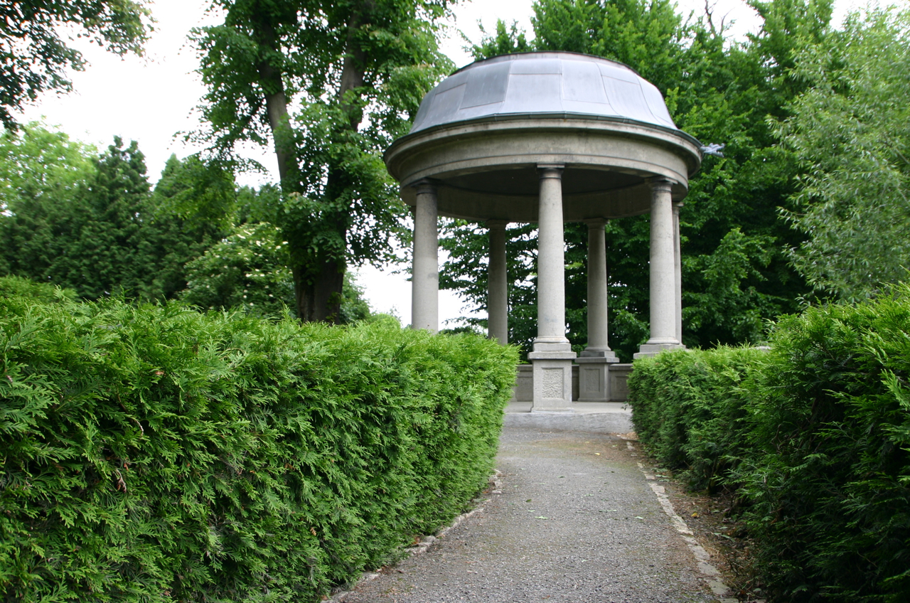 Rogów Opolski - wieś w Polsce, w powiecie opolskim.